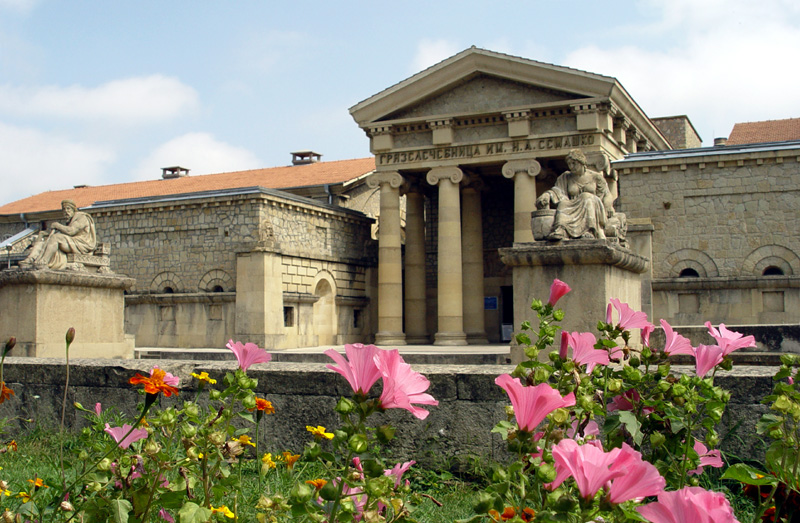 Грязелечебница им. Н.А. Семашко, г.Ессентуки. Построена в 1915 г. по проекту академика Шреттера Евгения Федоровича. Исполнитель работ архитектор-инженер Шамврицкий Иван Георгиевич